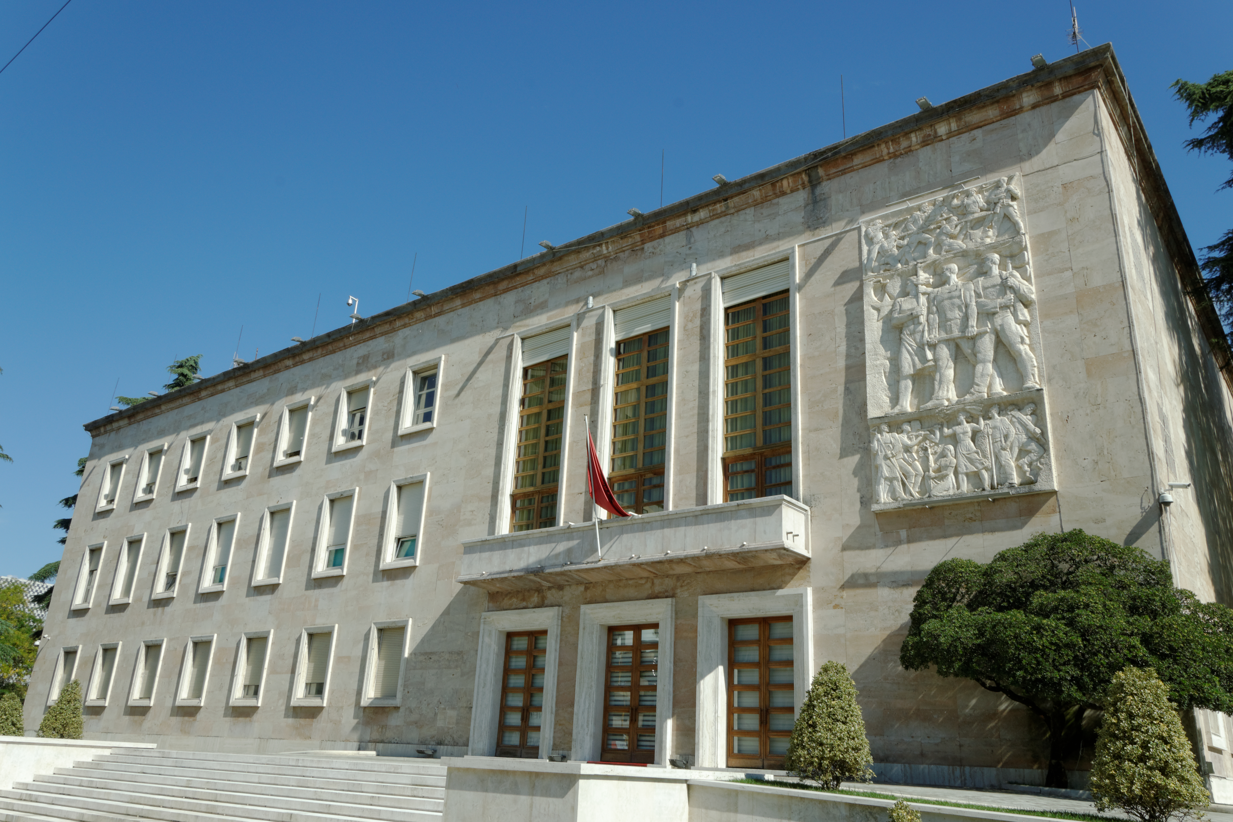 Ndërtesa e Kryeministrisë, Tiranë. The Building of the Prime Ministry of Albania. Foto by Dritan Mardodaj.